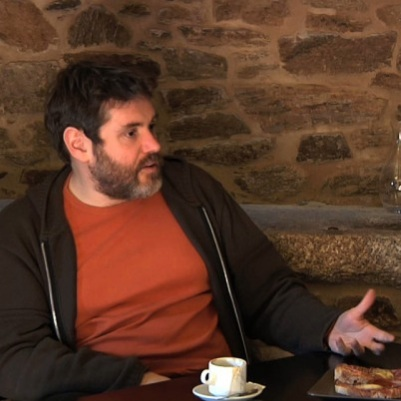 Jorge Coira nunha entrevista no 2012.